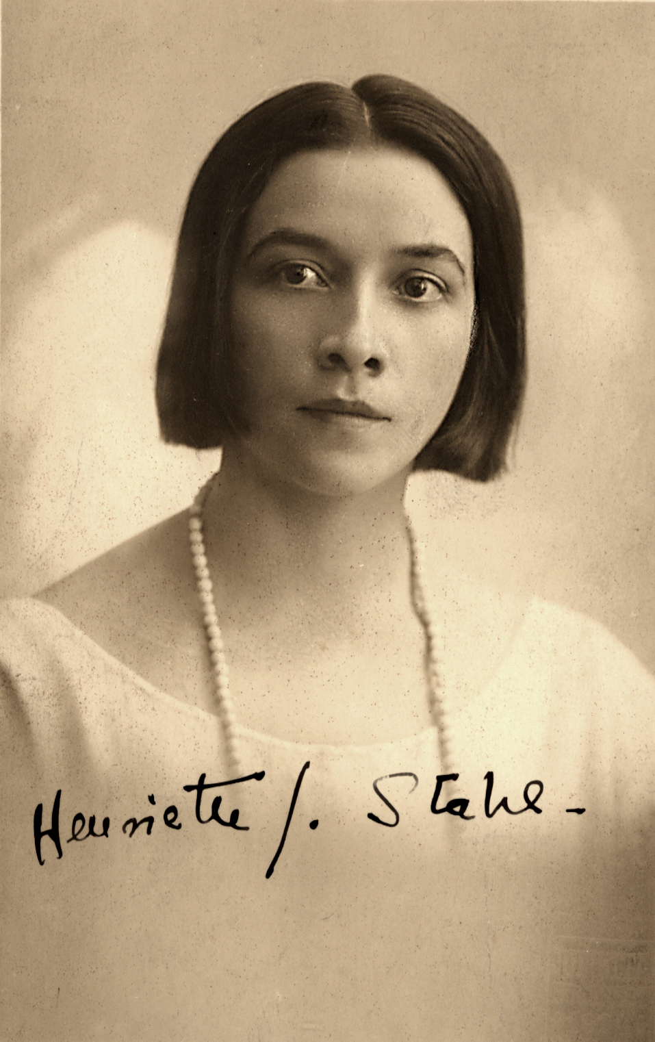 Imaginea se afla in colectia Bibliotecii Academiei Romane, Cabinetul de Stampe, cota 48837